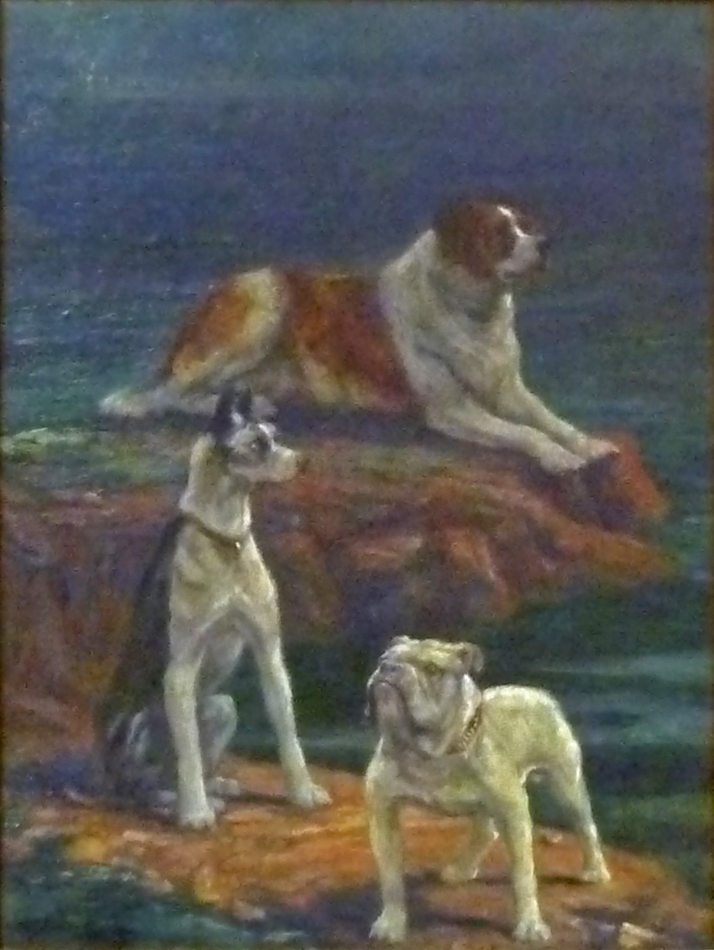 "Drie honden", olieverf op doek door de Belgische kunstschilder Charles Boland de Spa (1850- ?); 33 x 24 cm; privébezit